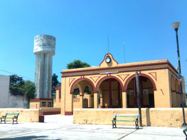 Fotografia del local de la comisaria de Molas, Yucatán.